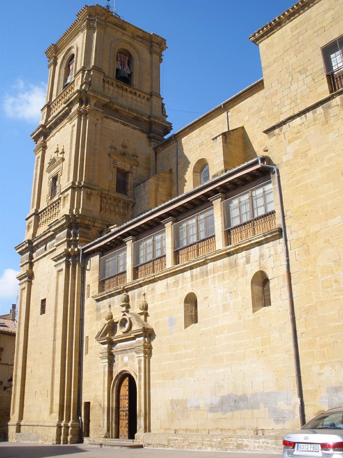 Iglesia de Santa María,Tafalla (Navarra)